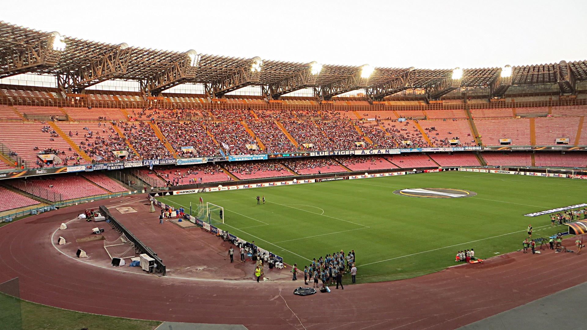 Stadio San Paolo (Napoli vs Club Brugge)